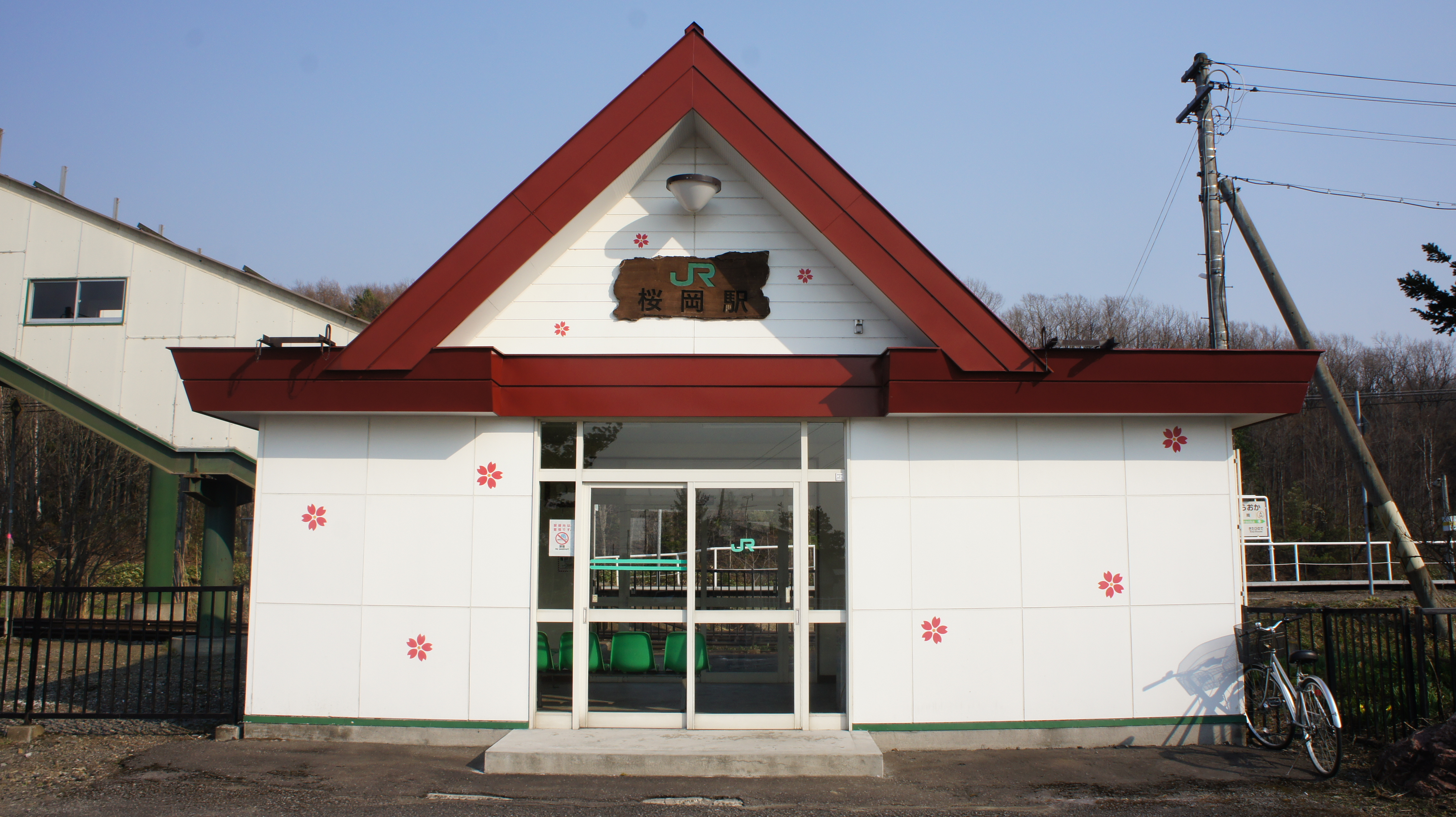 JR石北本線・桜岡駅の駅舎